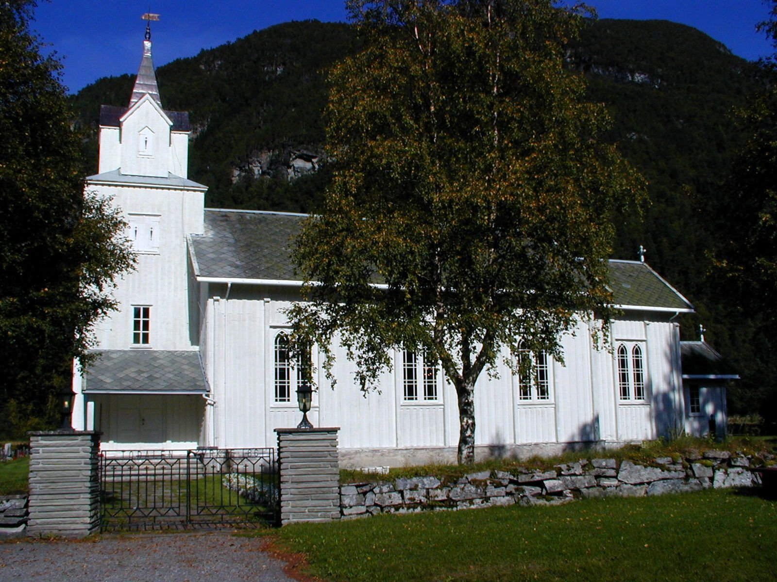 Todalen kirke. Foto: Max Ingar Mørk. Fra Riksantikvarens Kulturminnesøk.